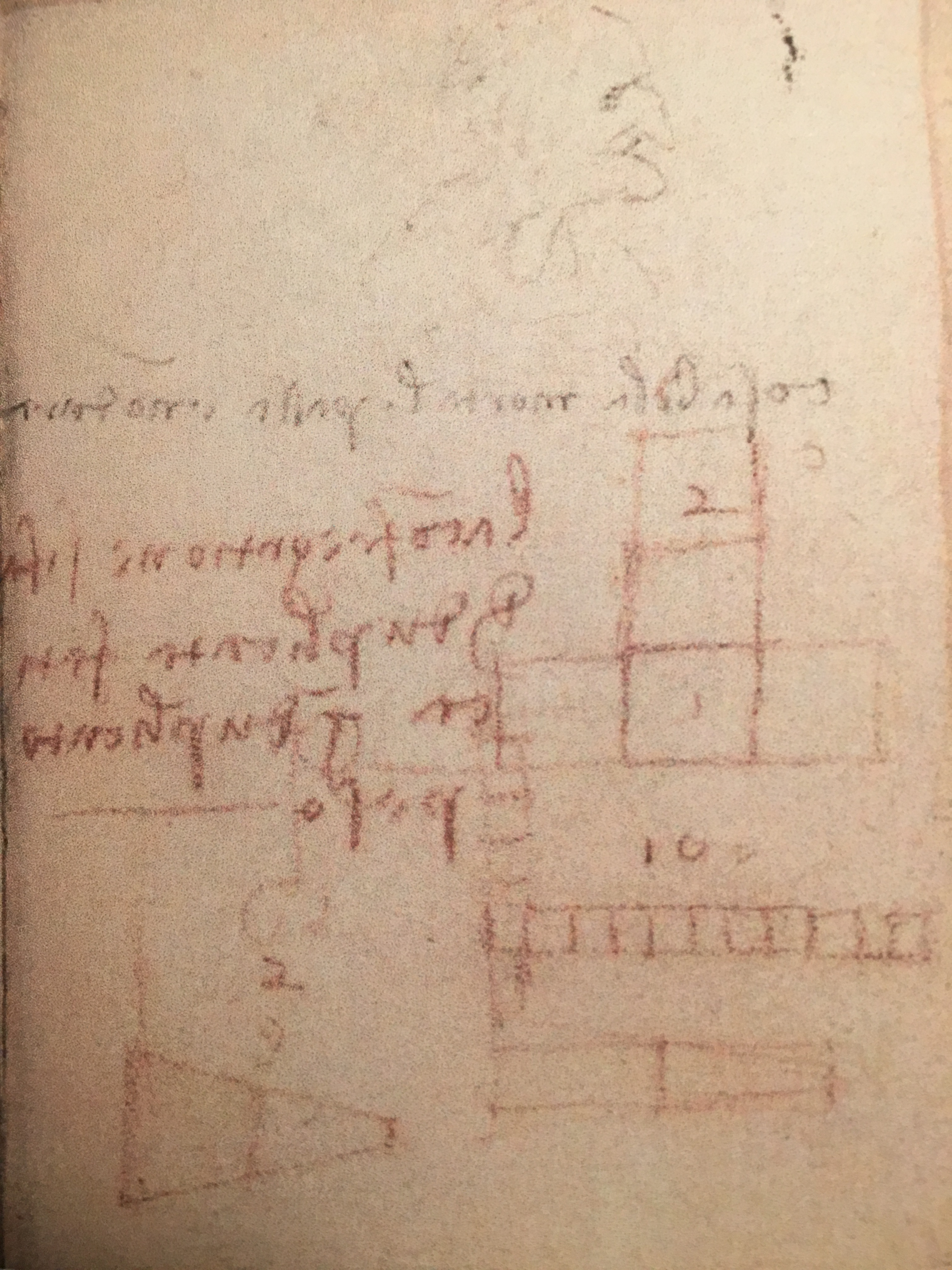 scarabocchi